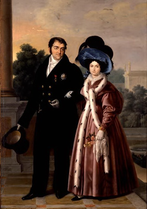 Retrato del rey Fernando VII de España (1784-1833) y de su cuarta esposa, la reina María Cristina de Borbón-Dos Sicilias.